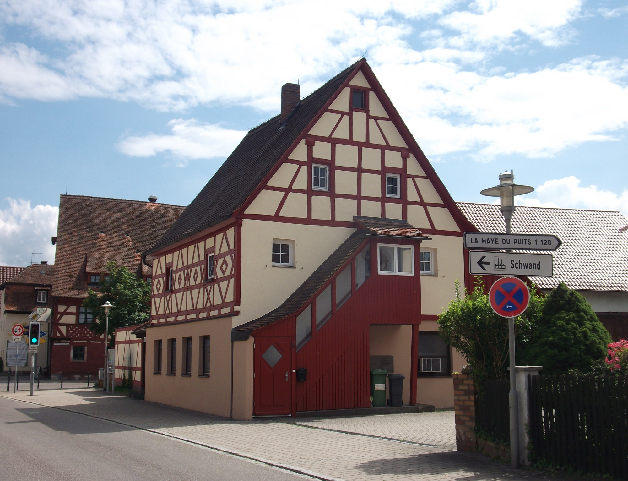 Zweigeschossiger Satteldachbau mit Fachwerk-Obergeschoss, im Kern spätes 17. Jahrhundert, 1953 überformt; früher Amtsknechtswohnung mit kleinem Gefängnis